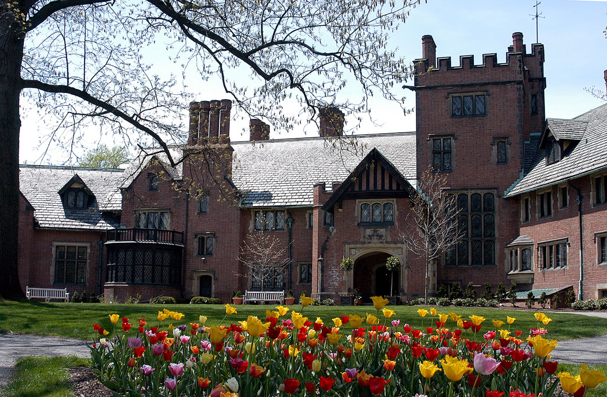 Akron-Stan Hywet Hall (BRLF) COLOR BALANCE BY COMMONS UPLOADER.